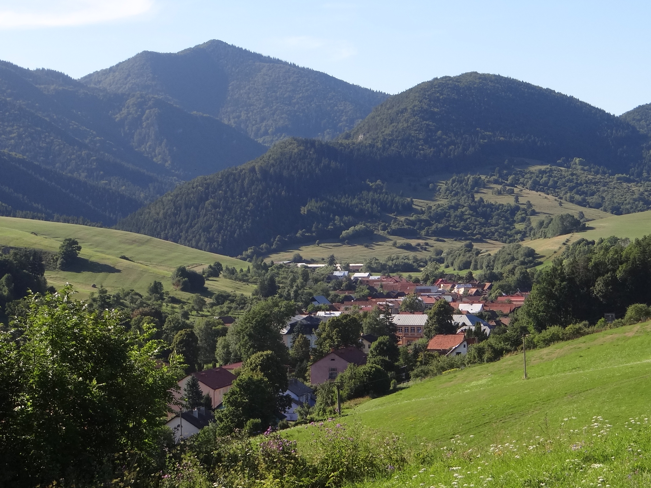 Istebné